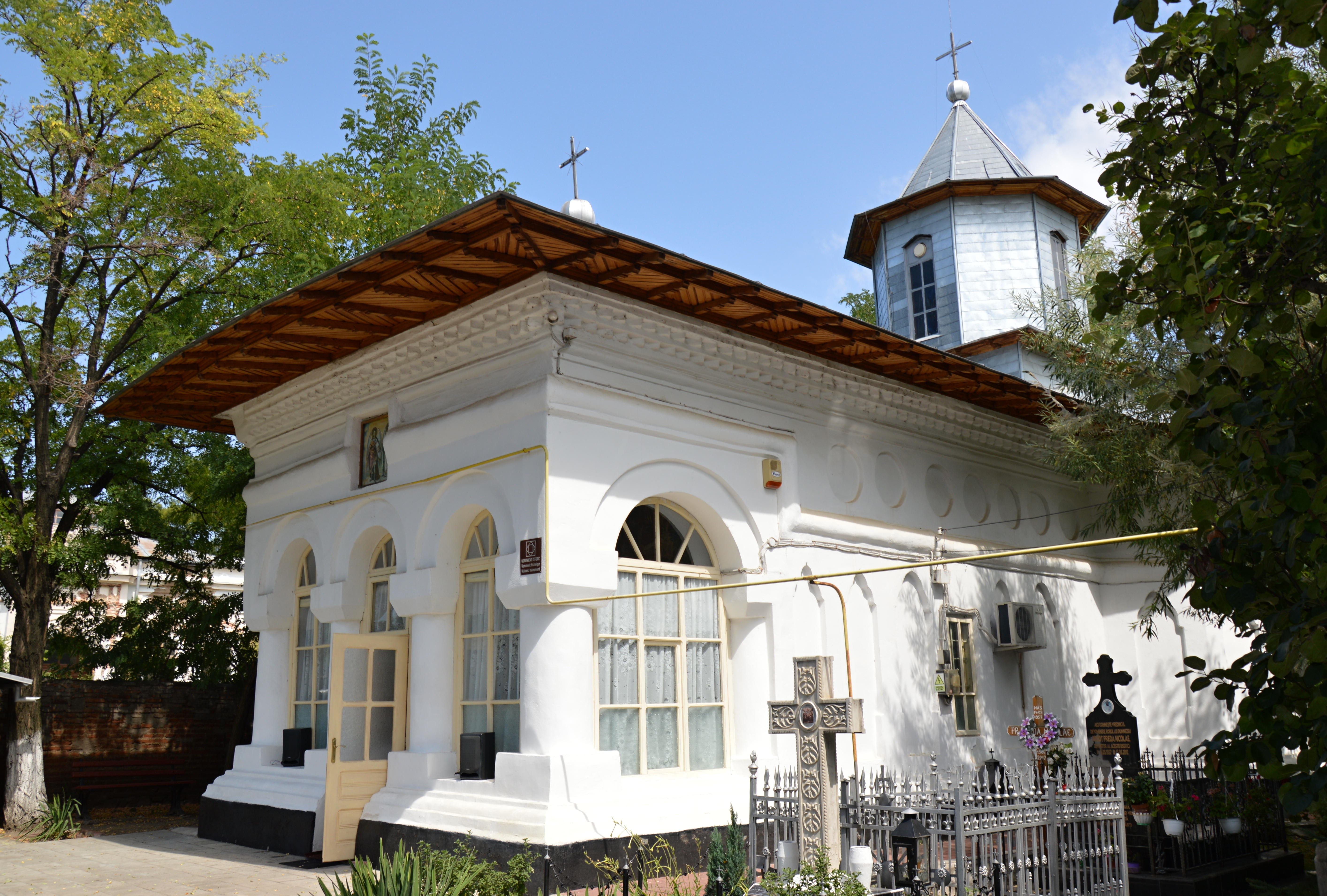 Biserica „Sf. Voievozi” - Câța